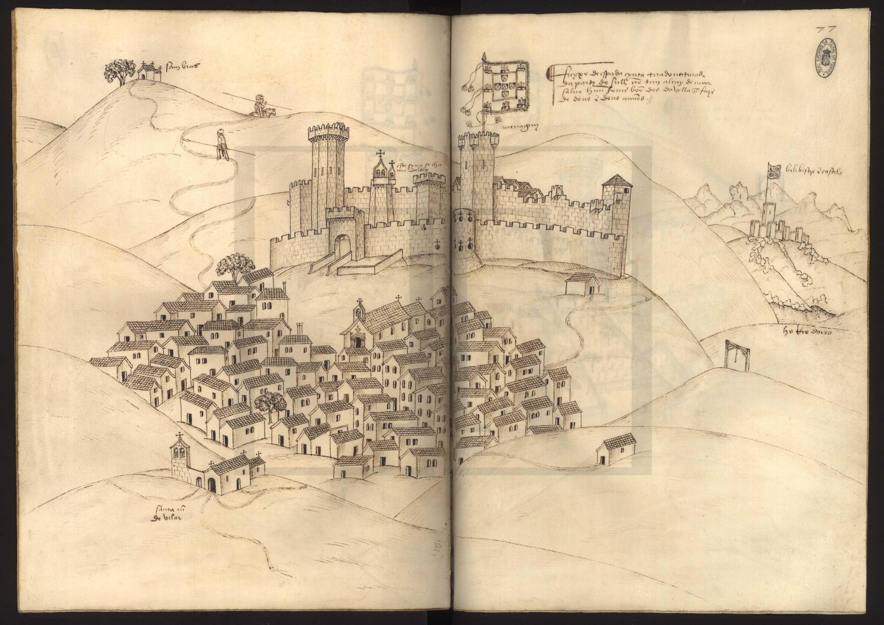 Livro das Fortalezas 77 - Freixo de Espada à Cinta